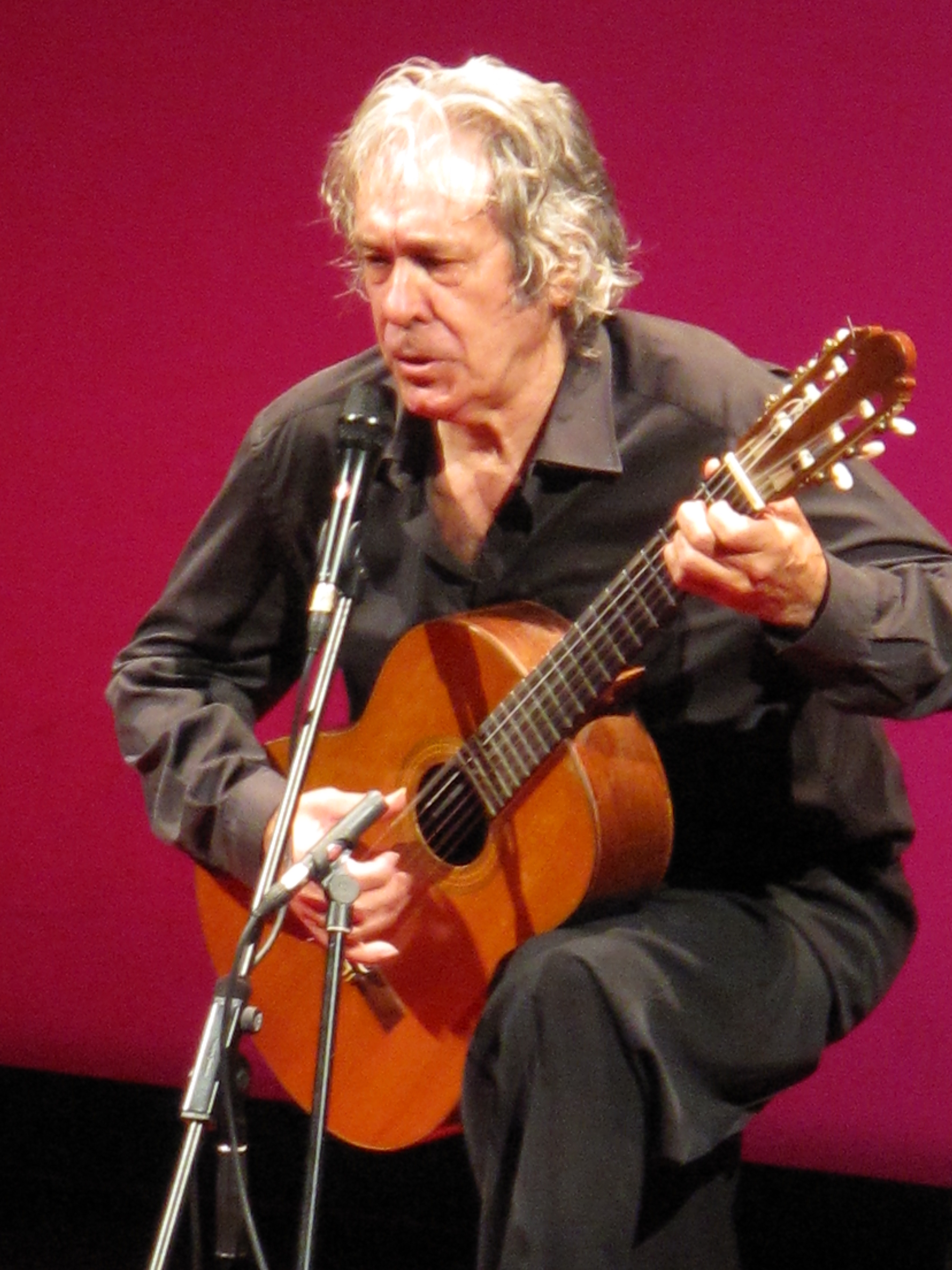 Paco Ibáñez cantando en el Teatro Victoria Eugenia de Donostia San Sebastián